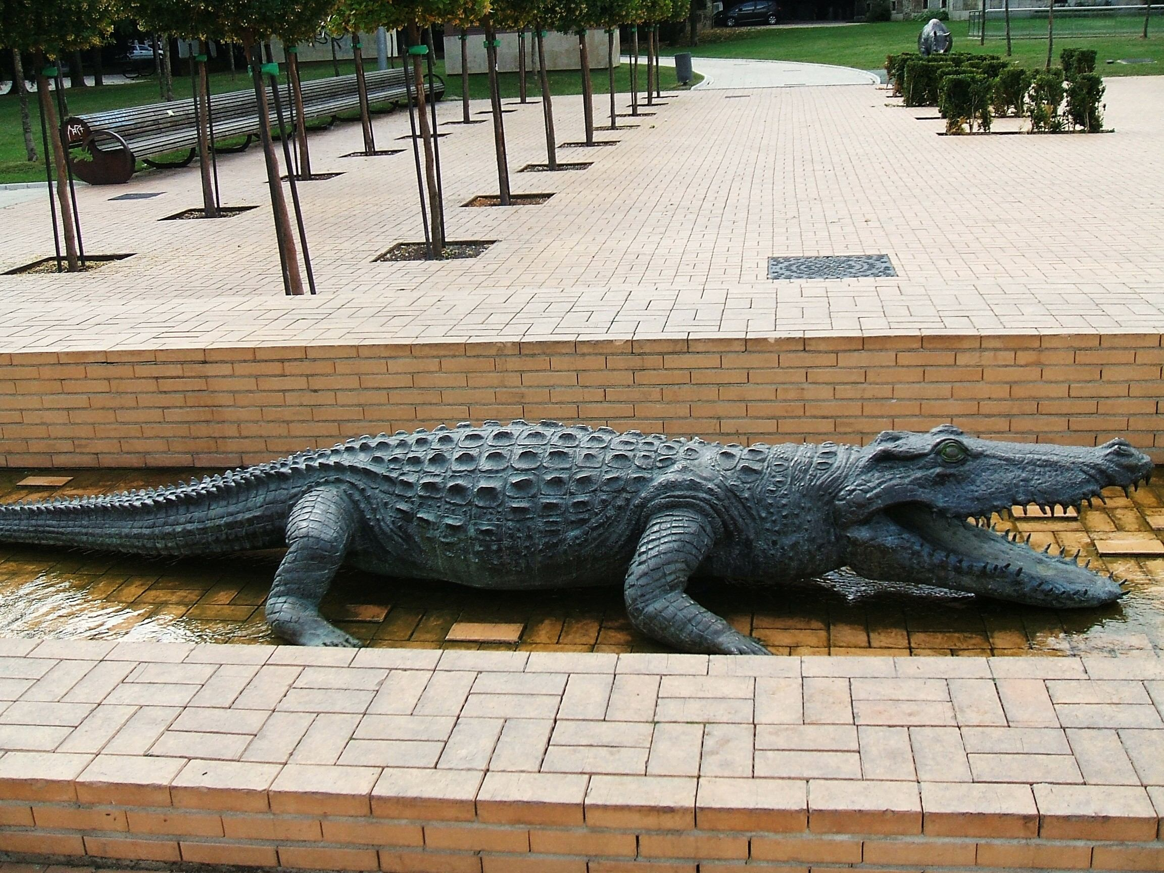 'Cocodrilo', obra en bronce de Koko Rico (2004), en los jardines traseros de la Catedral Nueva de Vitoria-Gasteiz. País Vasco, España.